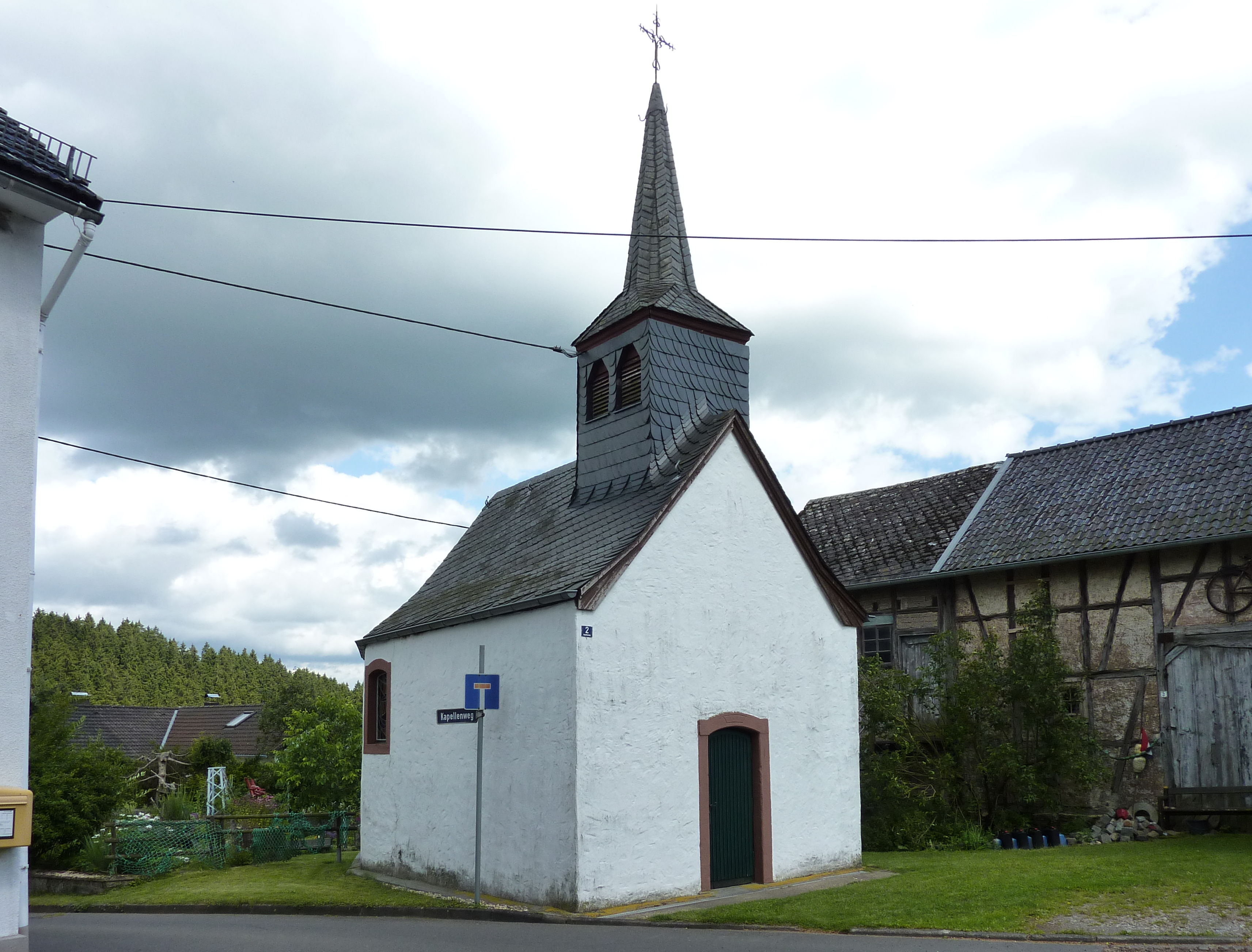 Kapelle